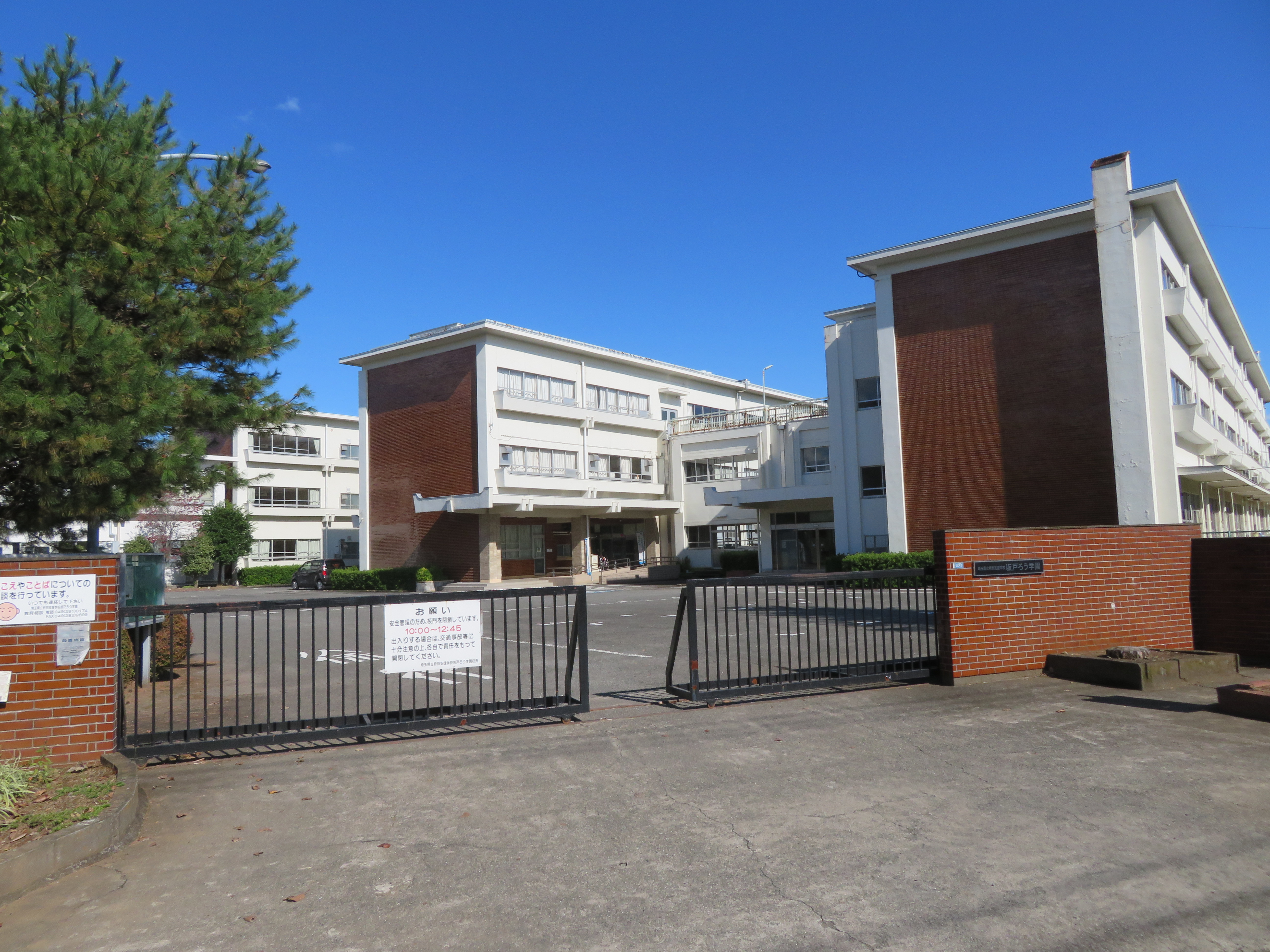 埼玉県坂戸市に所在する埼玉県立坂戸ろう学校校舎（正門付近を撮影） Canon PowerShot SX720 HS